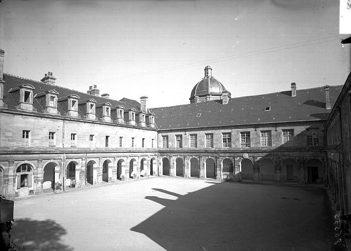 cloître de l'ancien couvent de la Visitation au sein du Quartier Lorge à Caen.